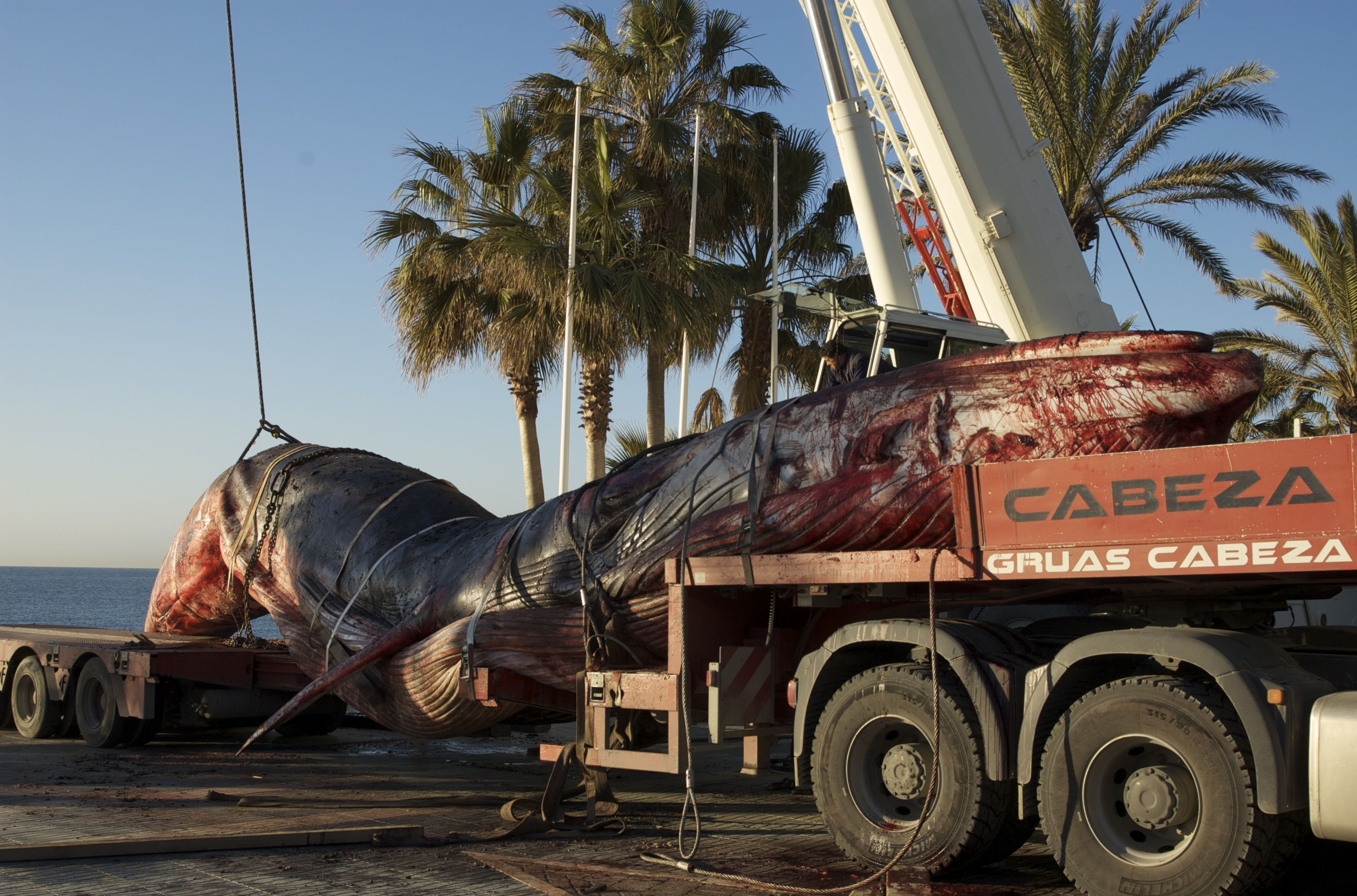 En SAN PEDRO DE ALCÁNTARA apareció un Rorcual comun Balaenoptera physalus de 19m. Que quedó varado. Aquí el ayuntamiento lo esta retirando de la playa.